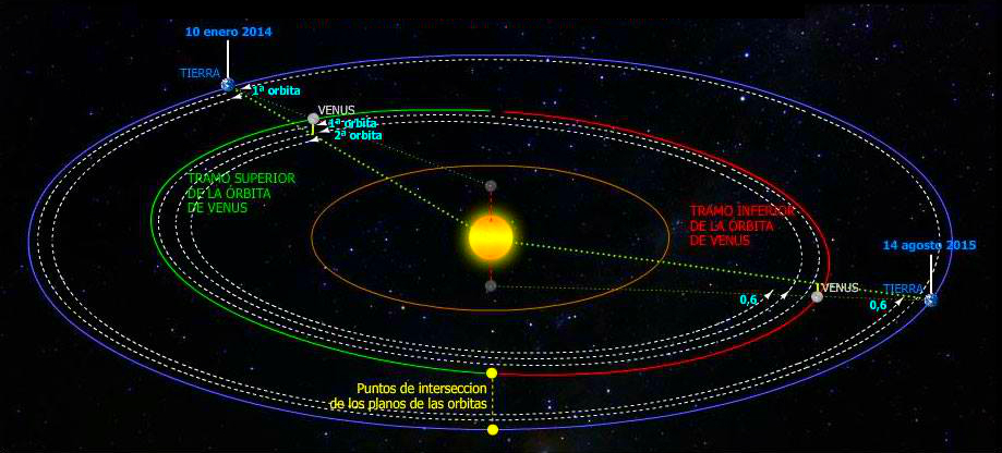 Movimientos orbitales de Venus y la Tierra entre dos conjunciones inferiores de Venus.